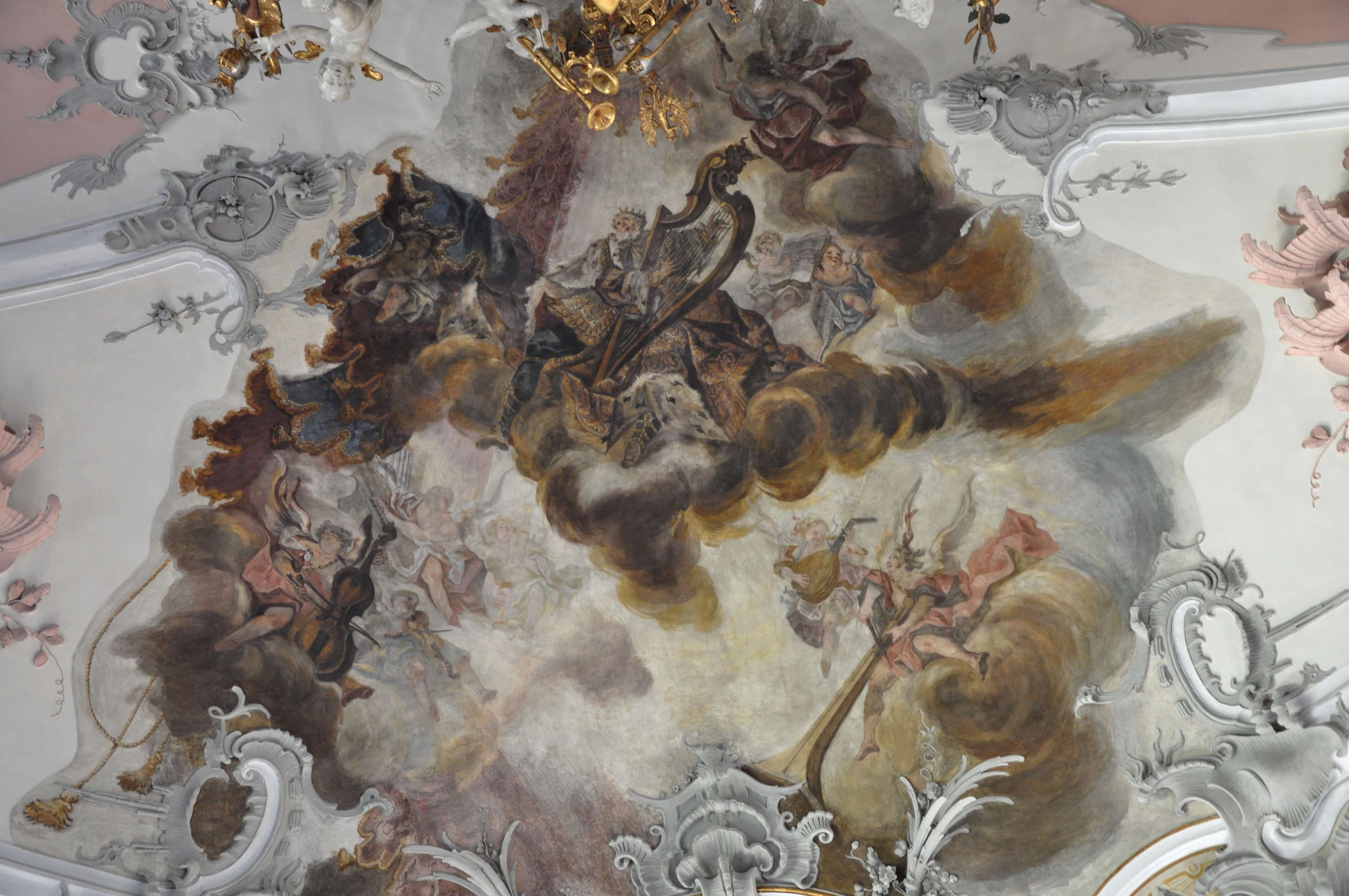 Klosterkirche Wald (Landkreis Sigmaringen), Johann Melchior Eggmann: Deckenfresko bei der Orgel: Engelskonzert und König David an der Harfe